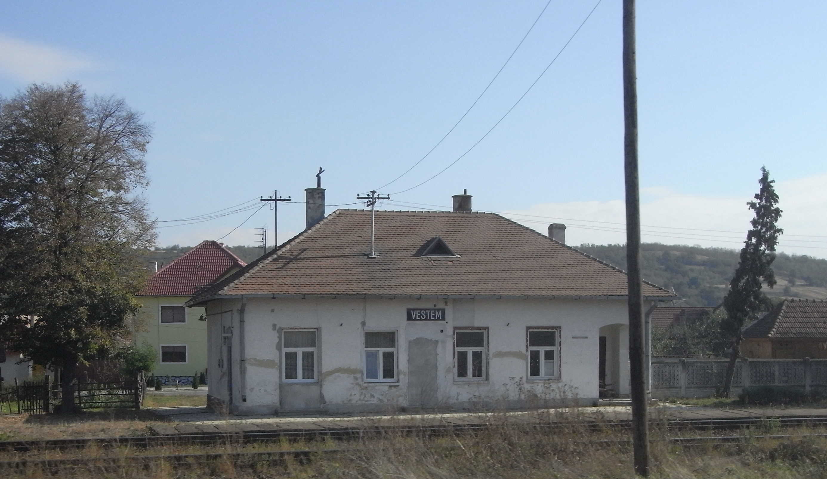 Bahnhof von Westen (Veștem; RO)